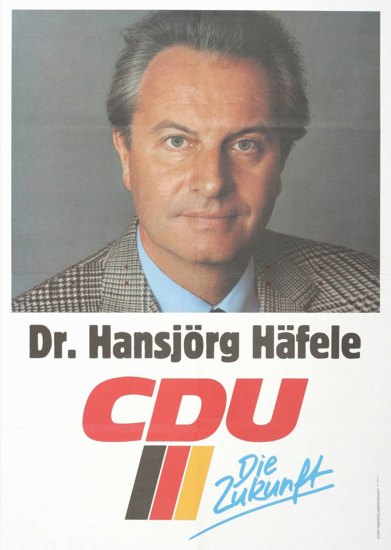 Dr. Hansjörg Häfele CDU Die ZukunftAbbildung:PorträtfotoPlakatart:Kandidaten-/Personenplakat mit PorträtAuftraggeber:Verantw.: CDU-Bundesgeschäftsstelle, Hauptabteilung Öffentlichkeitsarbeit, Konrad-Adenauer-Haus, BonnDrucker_Druckart_Druckort:Willy F.P. Fehling GmbH, HannoverObjekt-Signatur:10-001: 2984Bestand:Plakate zu Bundestagswahlen (10-001)GliederungBestand10-18:Plakate zu Bundestagswahlen (10-001) » Die 11. Bundestagswahl am 25. Januar 1987 » CDU » Mit PorträtfotoLizenz:KAS/ACDP 10-001: 2984 CC-BY-SA 3.0 DE